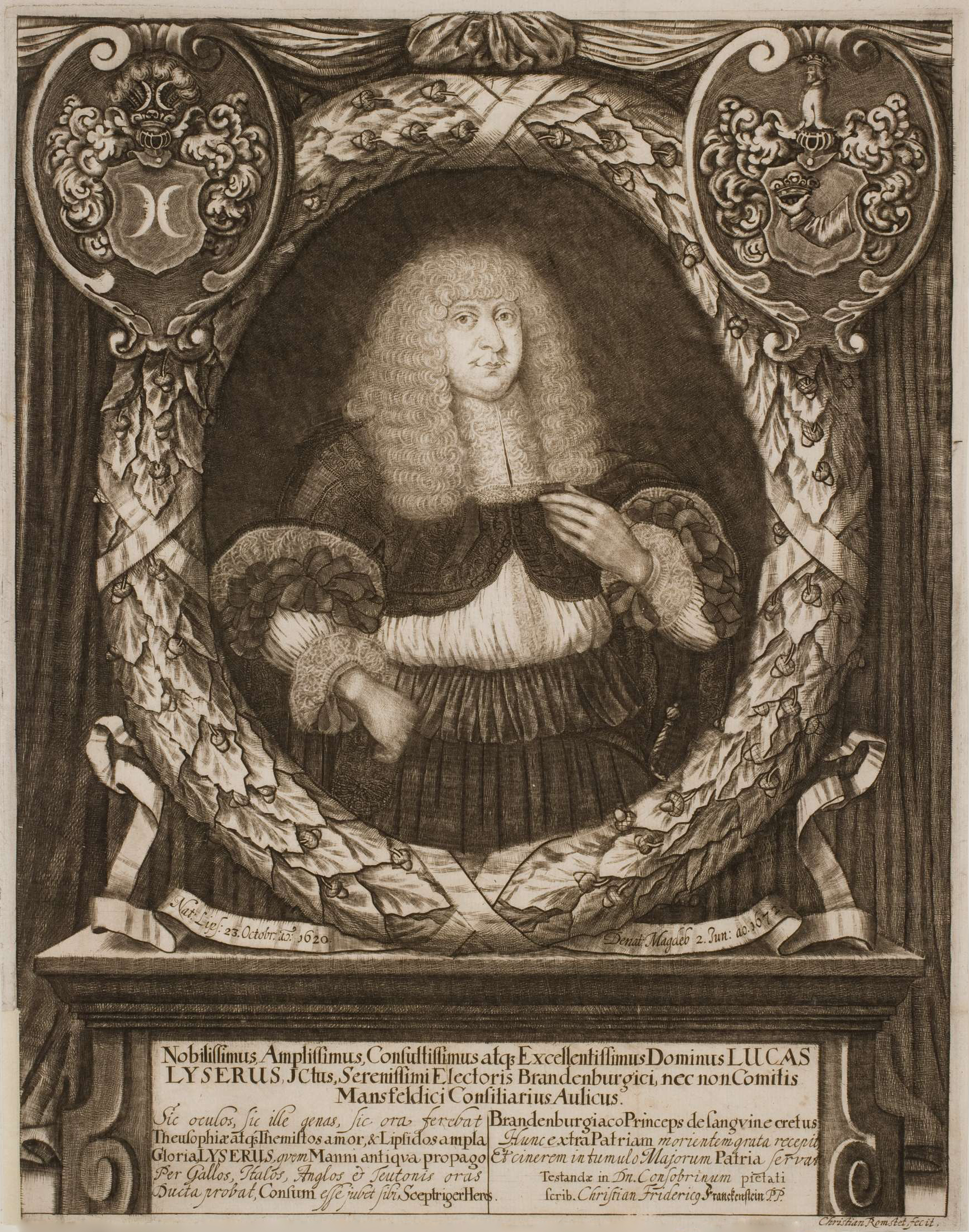 Lucas Leyser, Kupferstich von Chrisitan Romstet